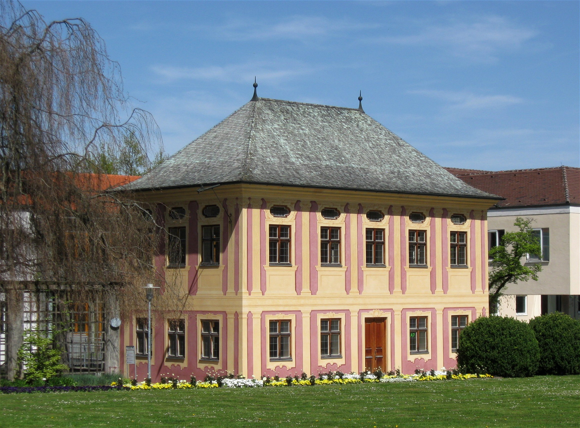 Am Hofgarten 8; ehem. Gartenhaus, sog. Salettl, zweigeschossiger Walmdachbau mit rekonstruierter Fenstergliederung und Fassadenbemalung, barock.